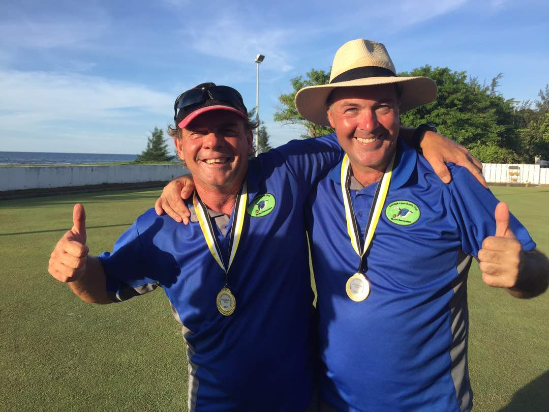 Mike Dawson & Paul Rigney dari Pasukan Panaga Team Three